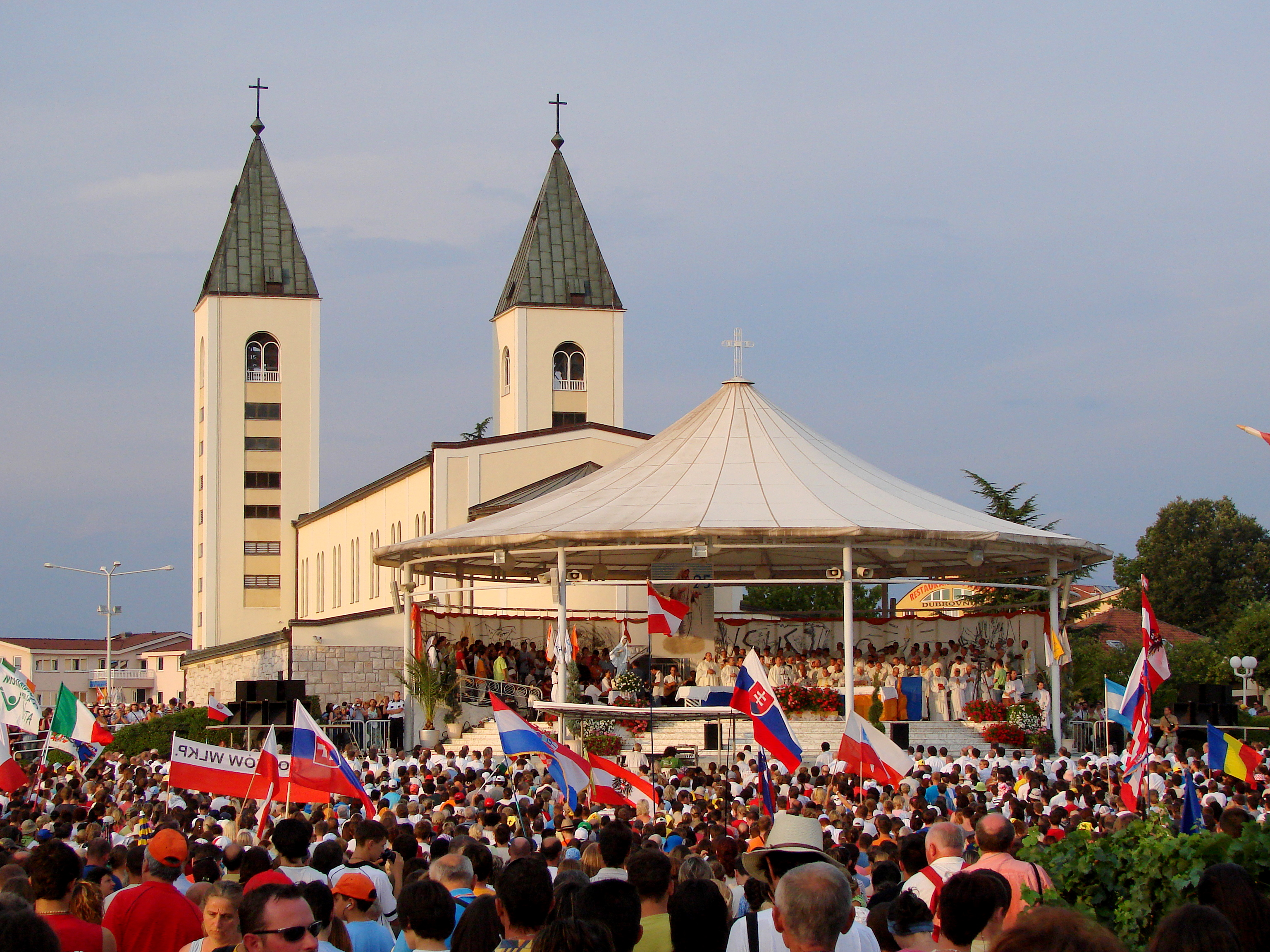 Od 1989 młodzi z całego świata gromadzą się w Medjugorie na Międzynarodowym Festiwalu Młodych.